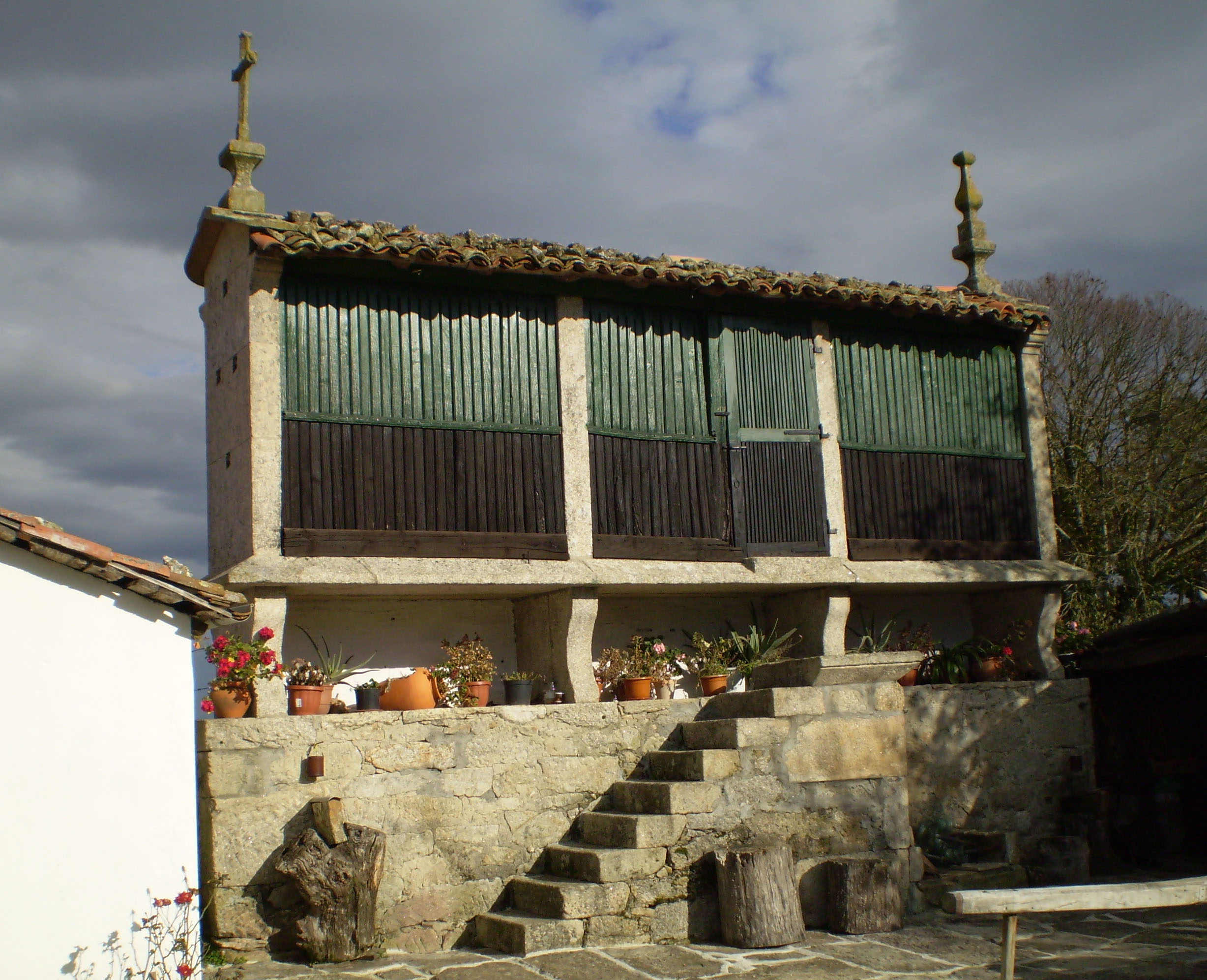 Hórreo tipo mahía, de tres claros, elevando sobre elaborada soleira de mampostería e catro cepas. Coroado por cruz latina e lampión fusiforme.